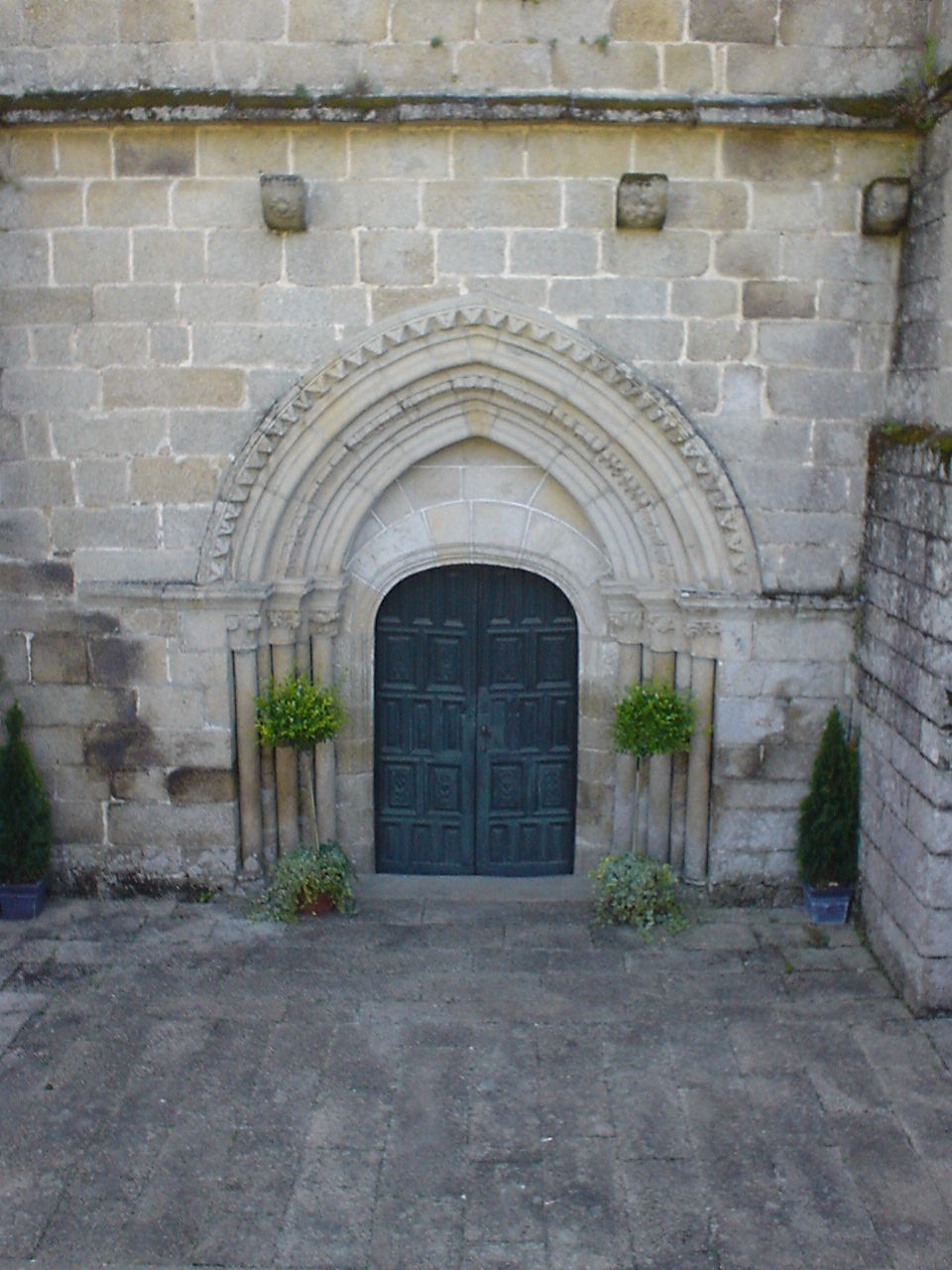 Kloster San Clodio (Ourense), Westportal der Kirche